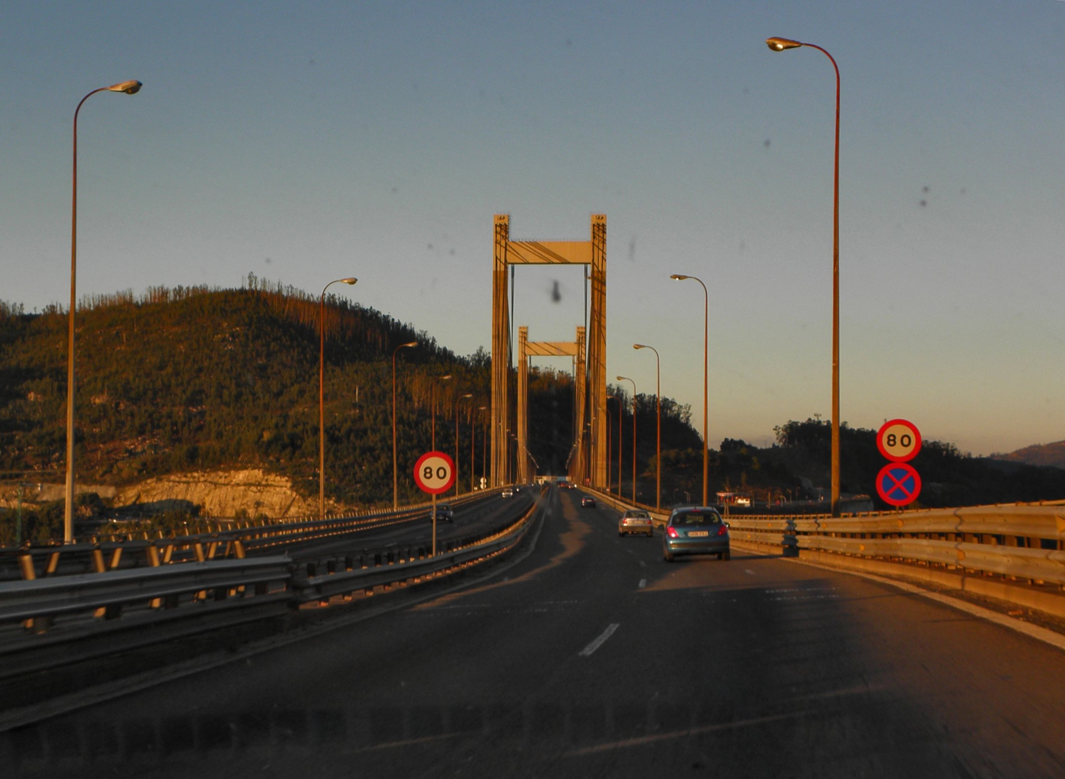 Redondela e Moaña